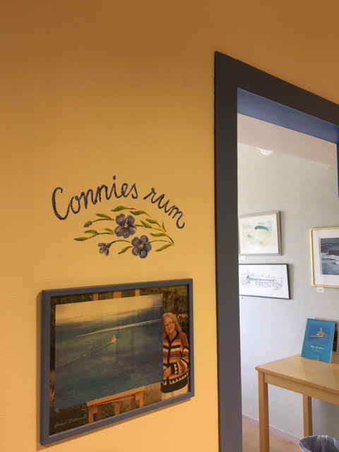 Foto av Connie Dellkrantzs rum på Bollnäs bibliotek